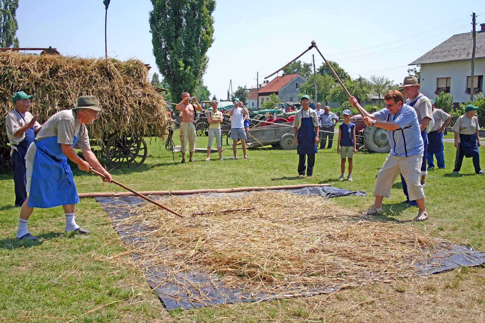 Žetev in mlačva po domače - žetev in mlačva nekdaj. Murski Črnci